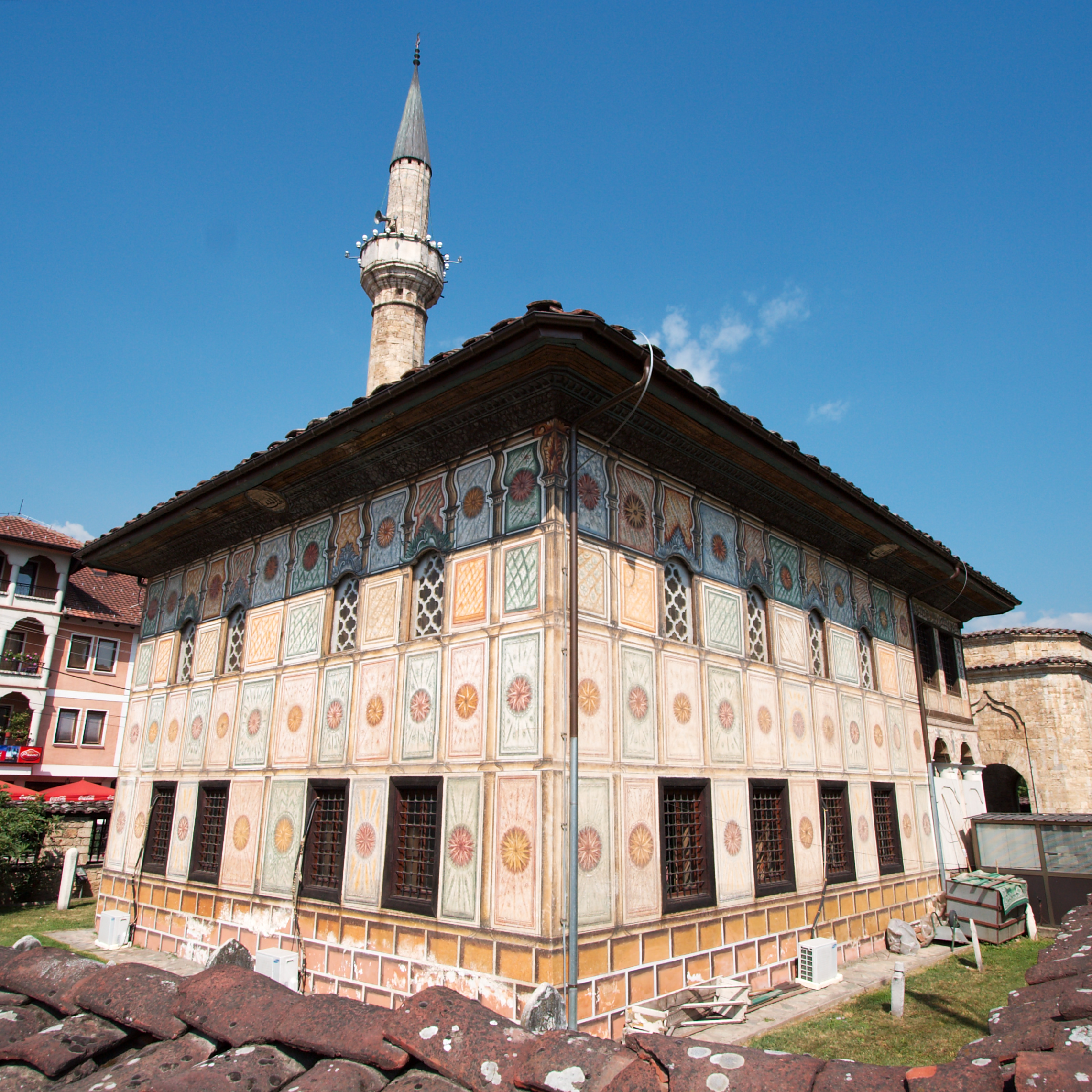 1459 erbaut.